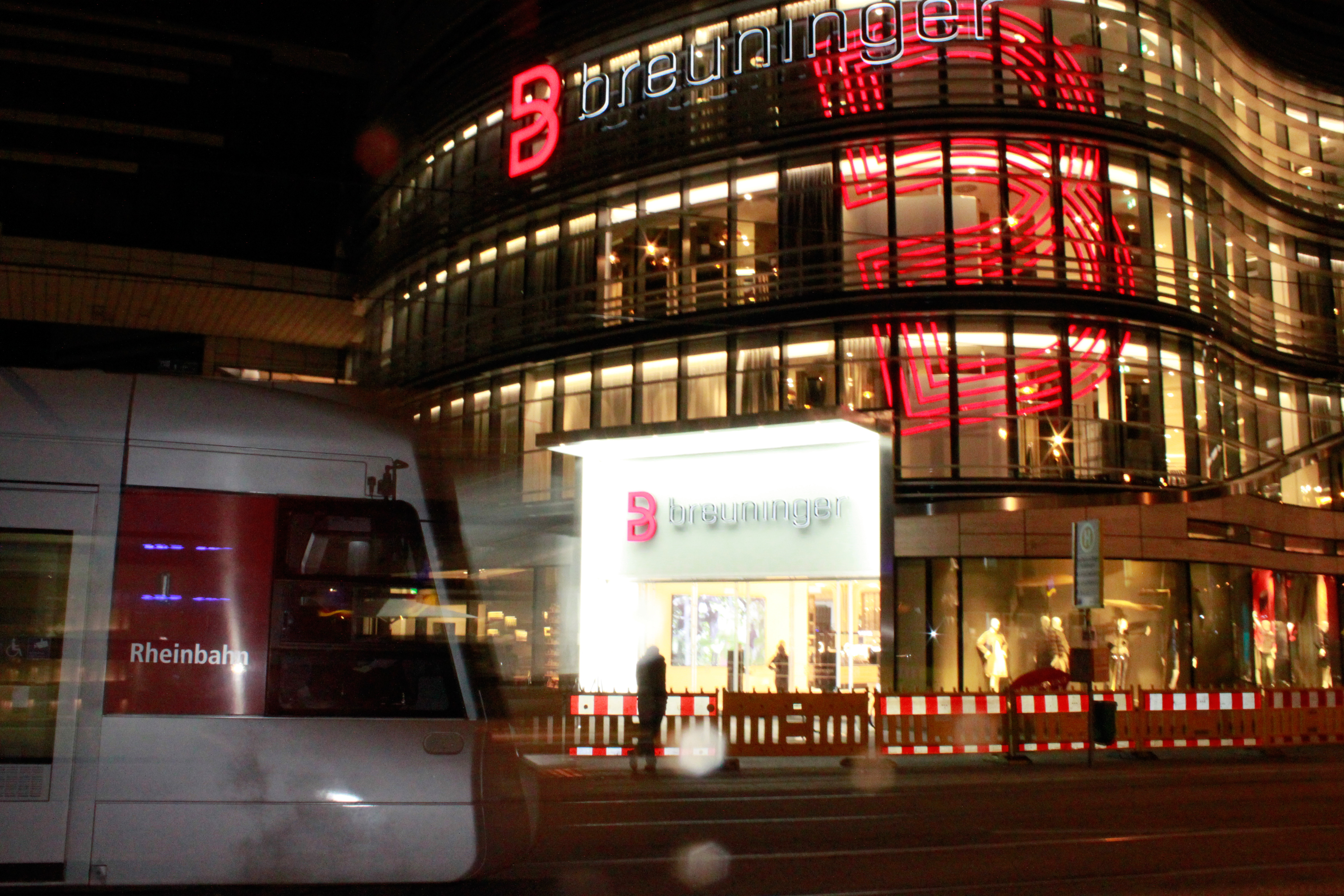 Breuninger-Warenhaus im Kö-Bogen, Düsseldorf. Eingang Schadowplatz. Niederflur-Straßenbahn der Rheinbahn.